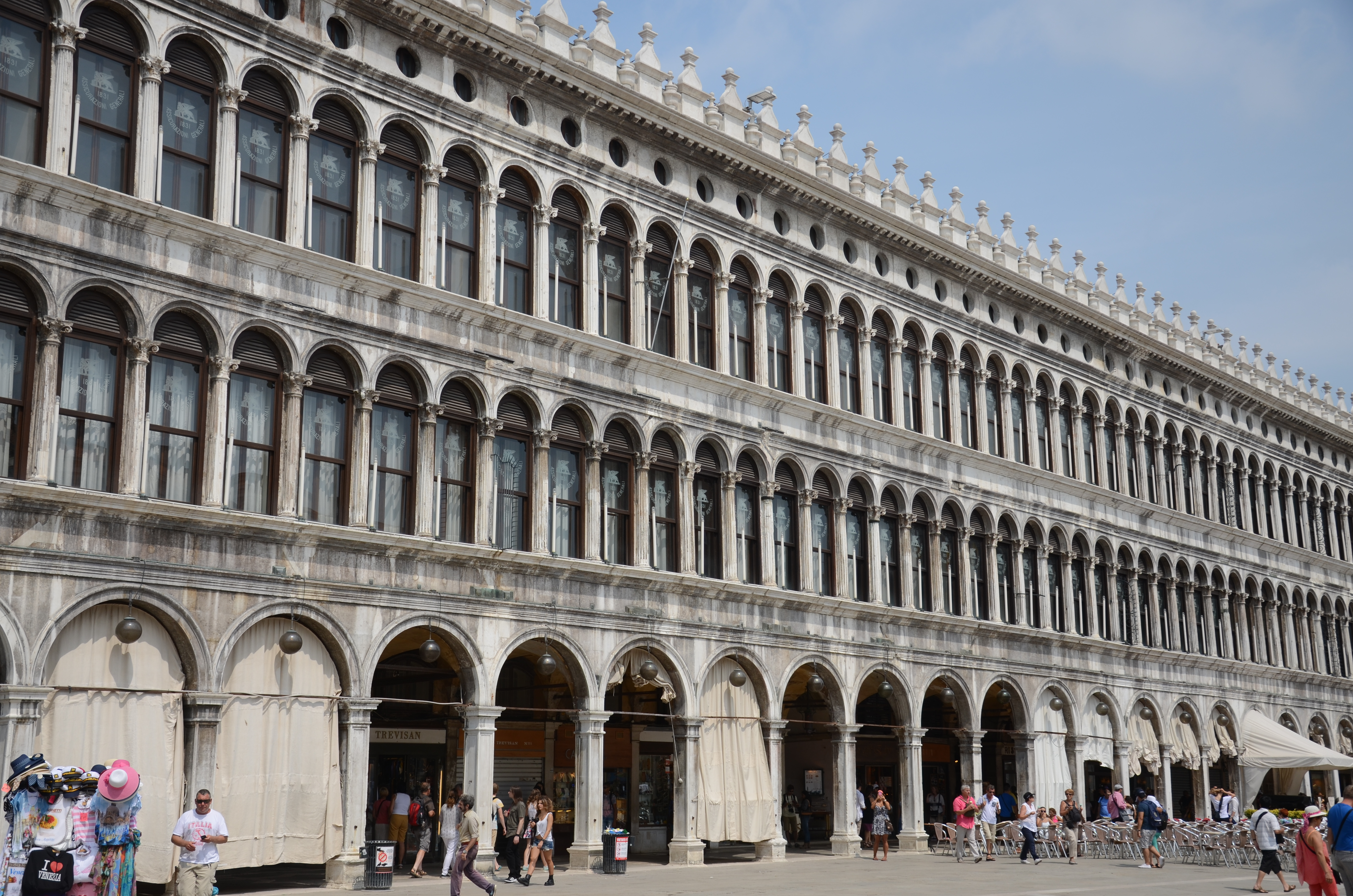 San Marcoplein in Venetië.